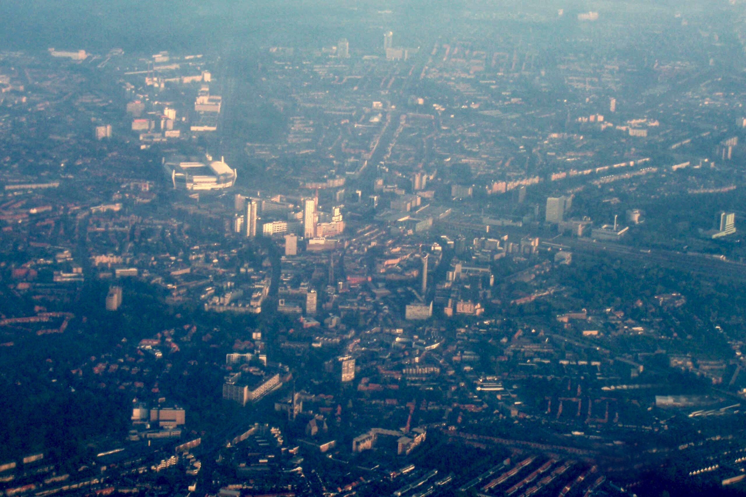 Luchtfoto van het centrum van Eindhoven. Hier zijn mooi de vorderingen op hoogbouwgebied te zien. Naast het jarenlange baken in de binnenstad, de Regent, is goed te zien hoe er gewerkt wordt aan de Admirant (wit gebouw, rechts van de Regent), en de, slecht zichtbare, Vestedatoren aan de Vestdijk. Doordat deze toren van dit aanzichtspunt zeer slank is, is het gebouw nauwlijks zichtbaar. Verder is ook het Philips Stadion en het Strijp S complex duidelijk herkenbaar. Ook opvallend is dat het nieuwe Catharinahuis door de feloranje kleur goed opvalt vanuit de lucht.